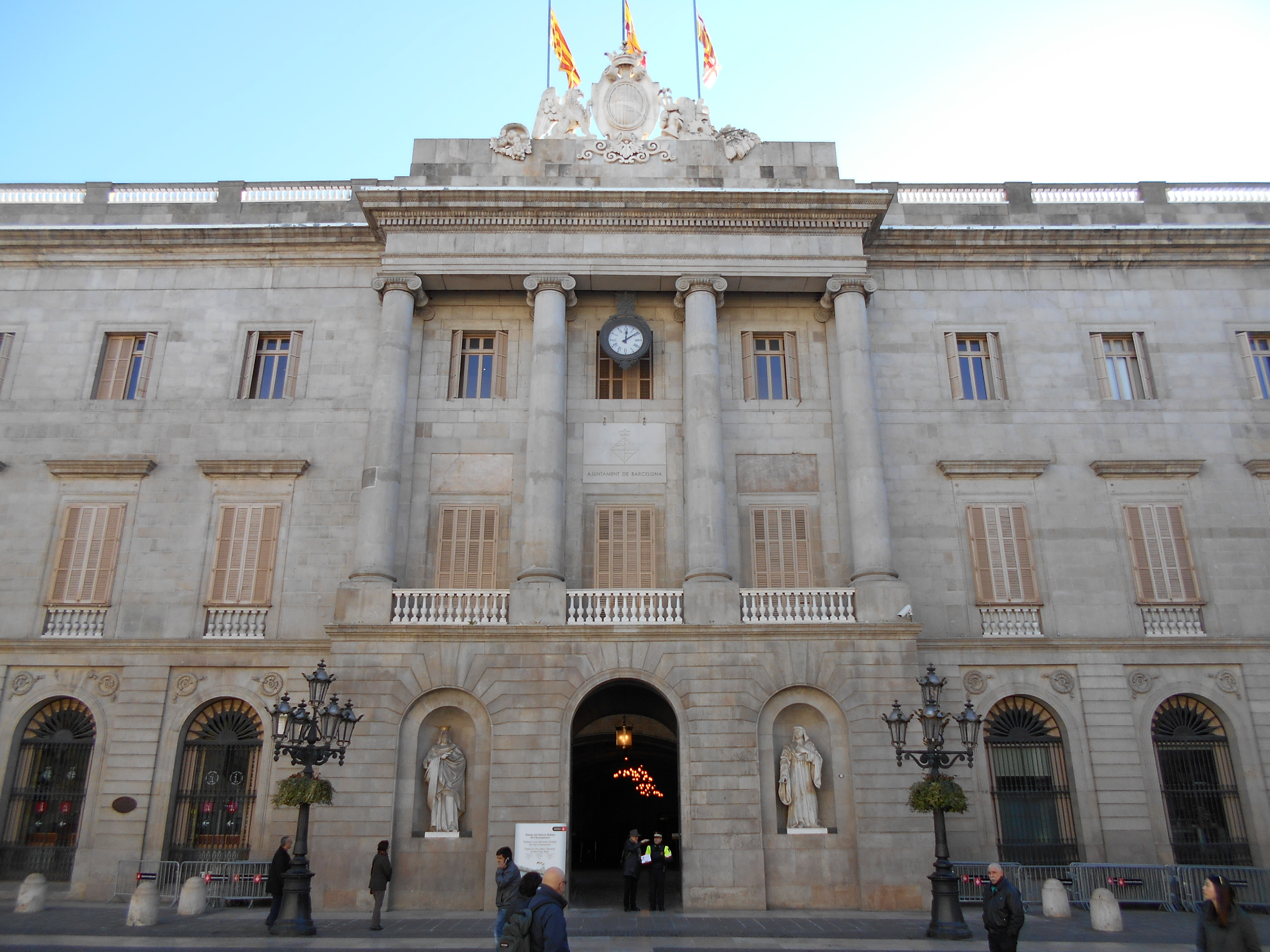 Fachada del Ayuntamiento de Barcelona.